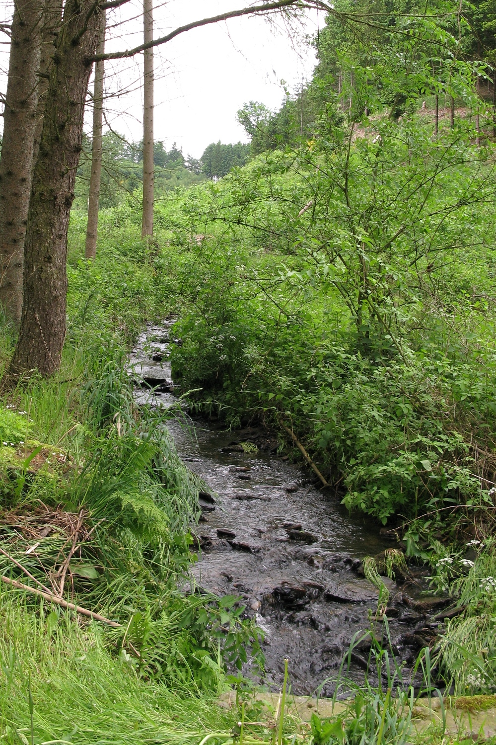 D'Hämichtbaach 50 m virum Zesummelaf mat der Wemperbaach . Hamichtbaach